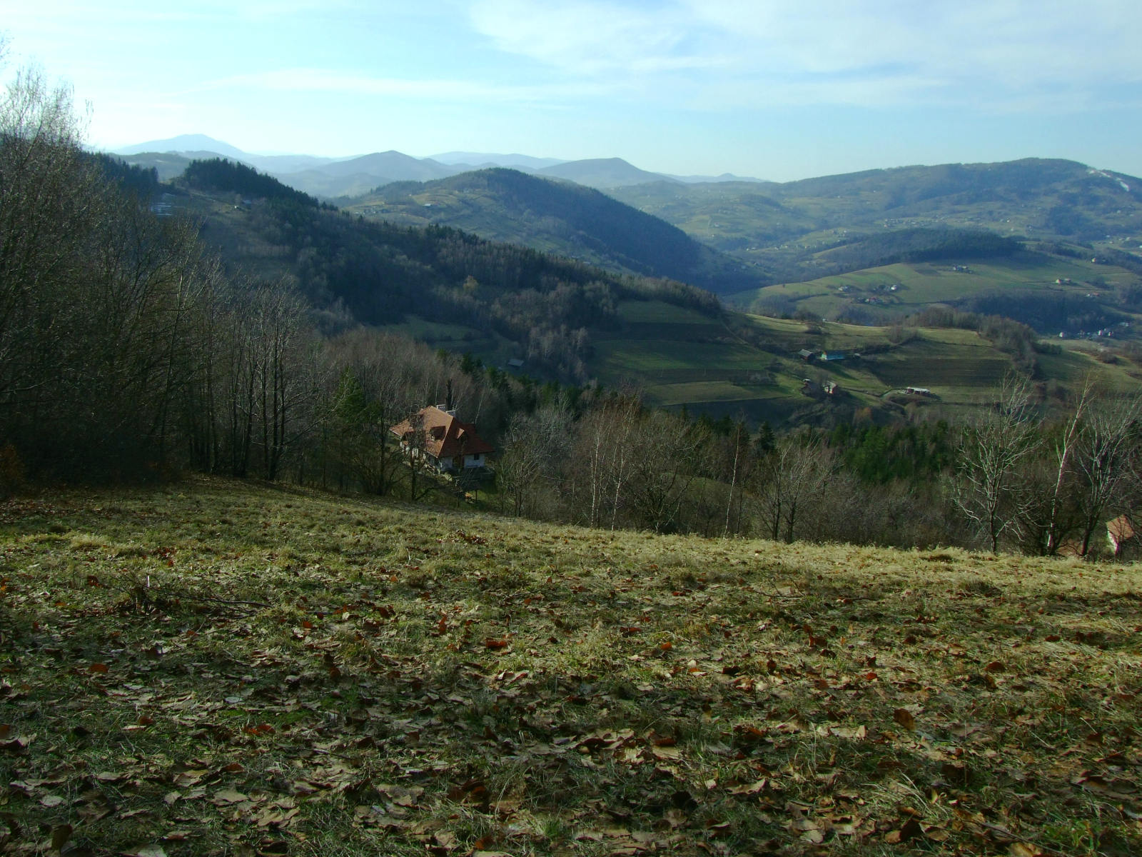 Laskowa (województwo małopolskie). Widok ogólny górnej części wsi.